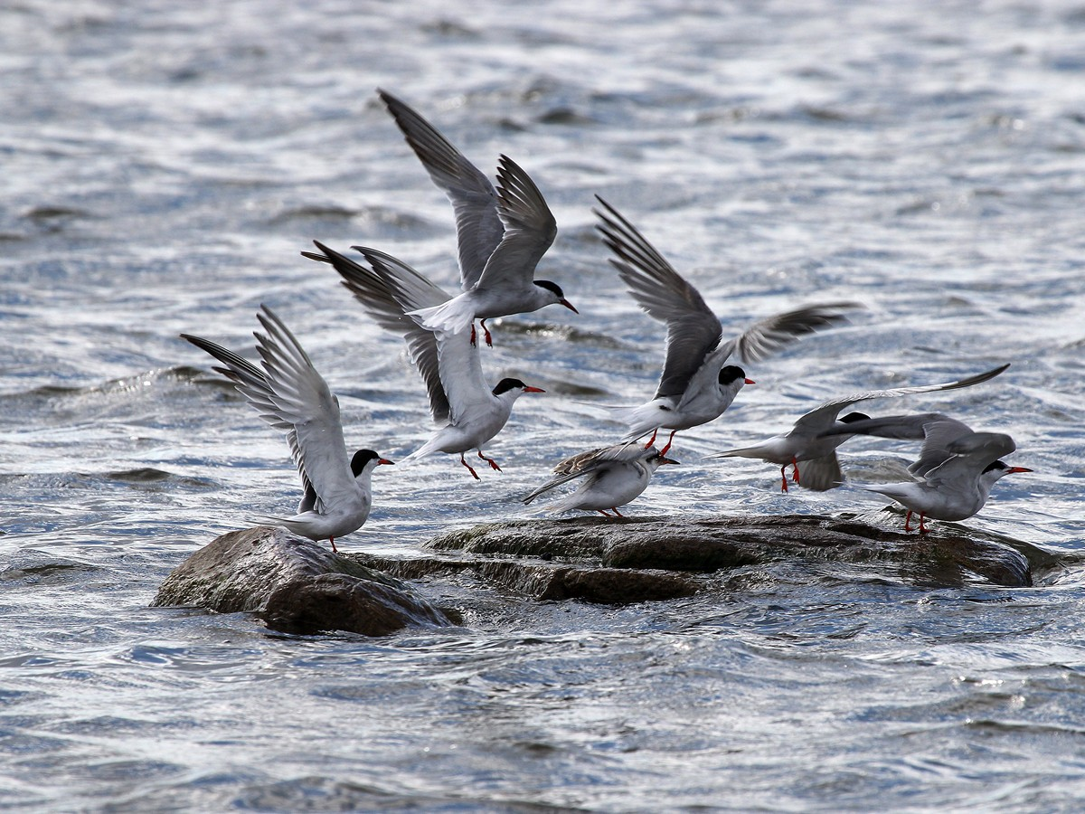 Fluss-Seeschwalben in Mecklenburg